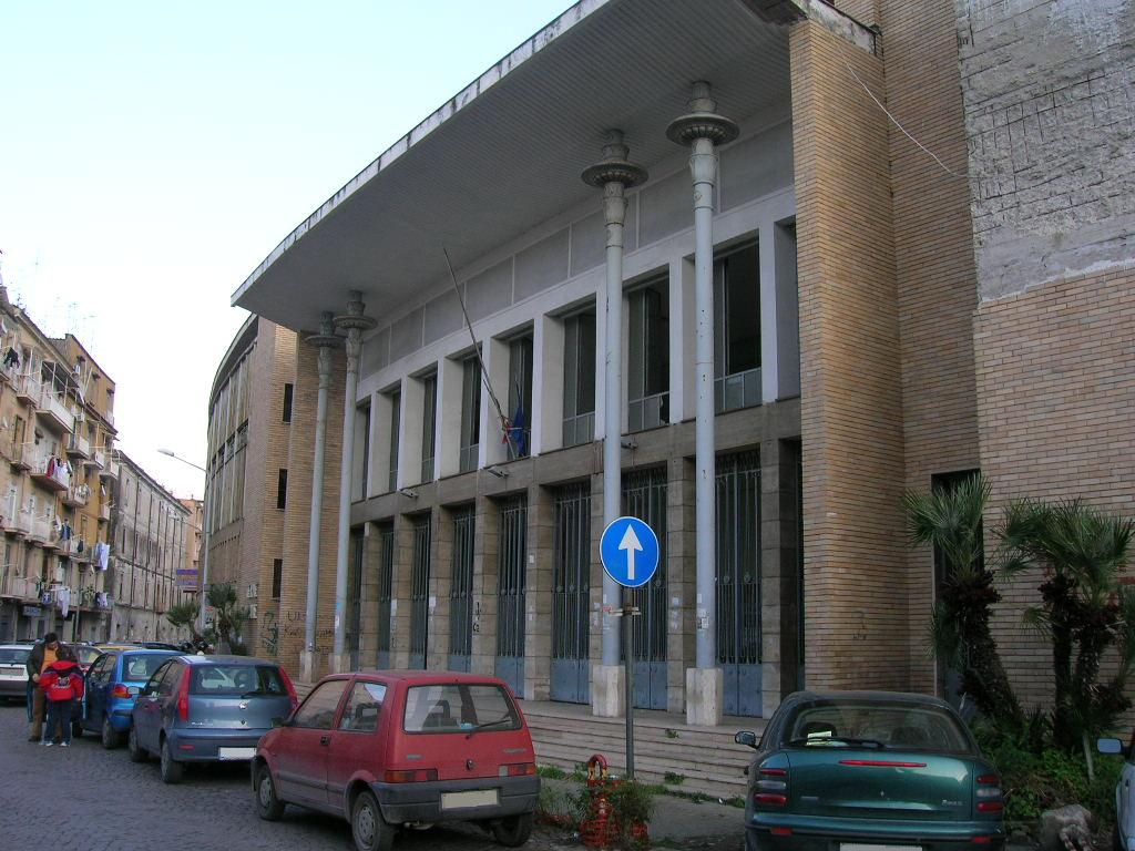 Castellammare di Stabia ingresso antiche terme